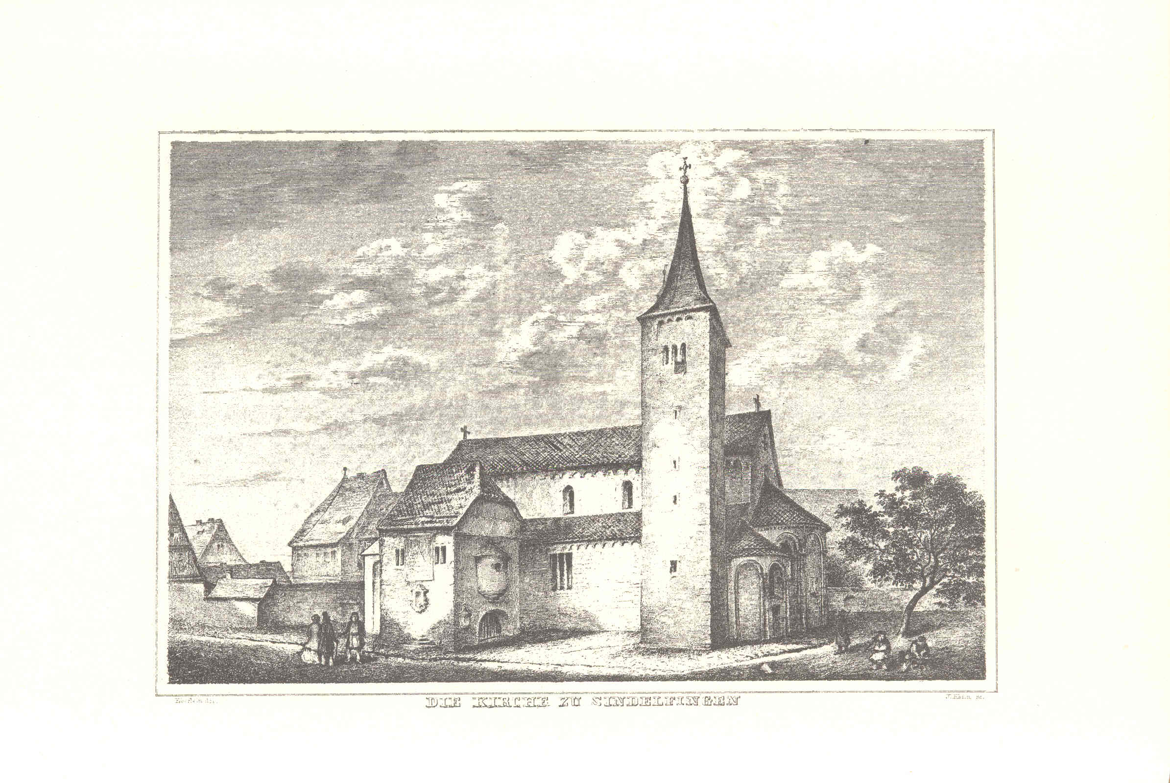 Beschreibung des Oberamts Böblingen